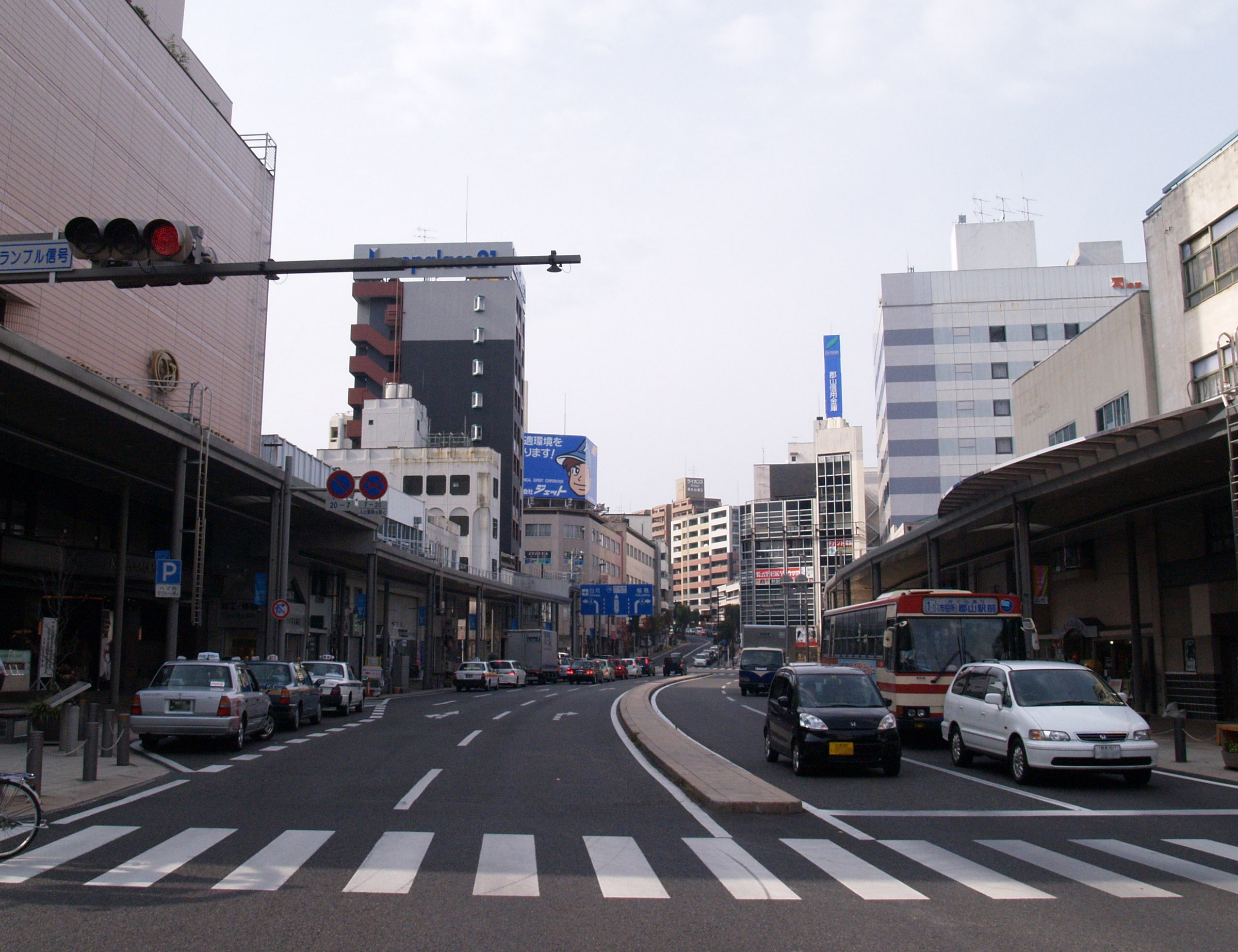 福島県道17号郡山停車場線（郡山駅付近）